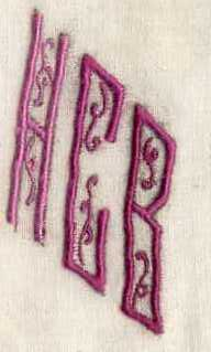 Chiffre au point de cordon décoré de vermicelle. Collection M.Peccaud